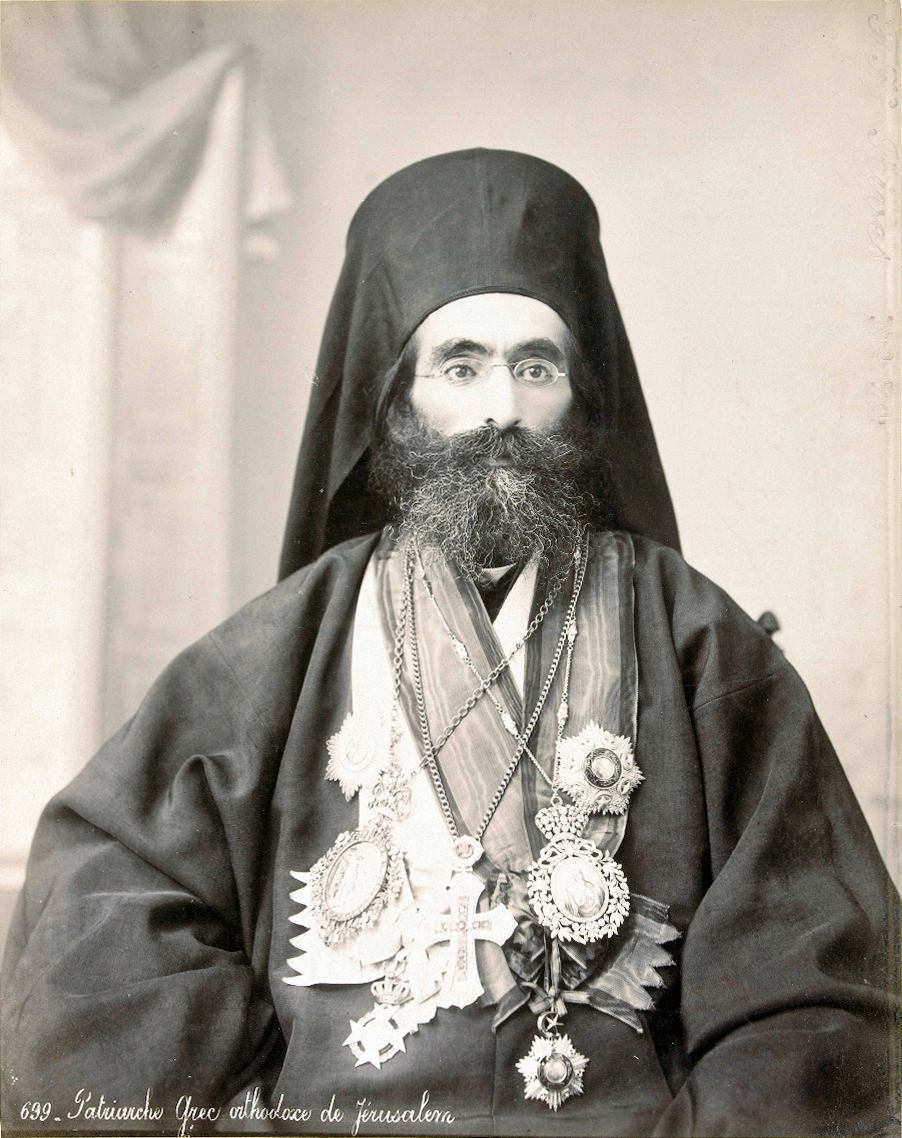 Путешествие по Ближнему Востоку и Египту Ричарда Полака в 1895-1896 гг. Греческий Патриарх Иерусалимский.